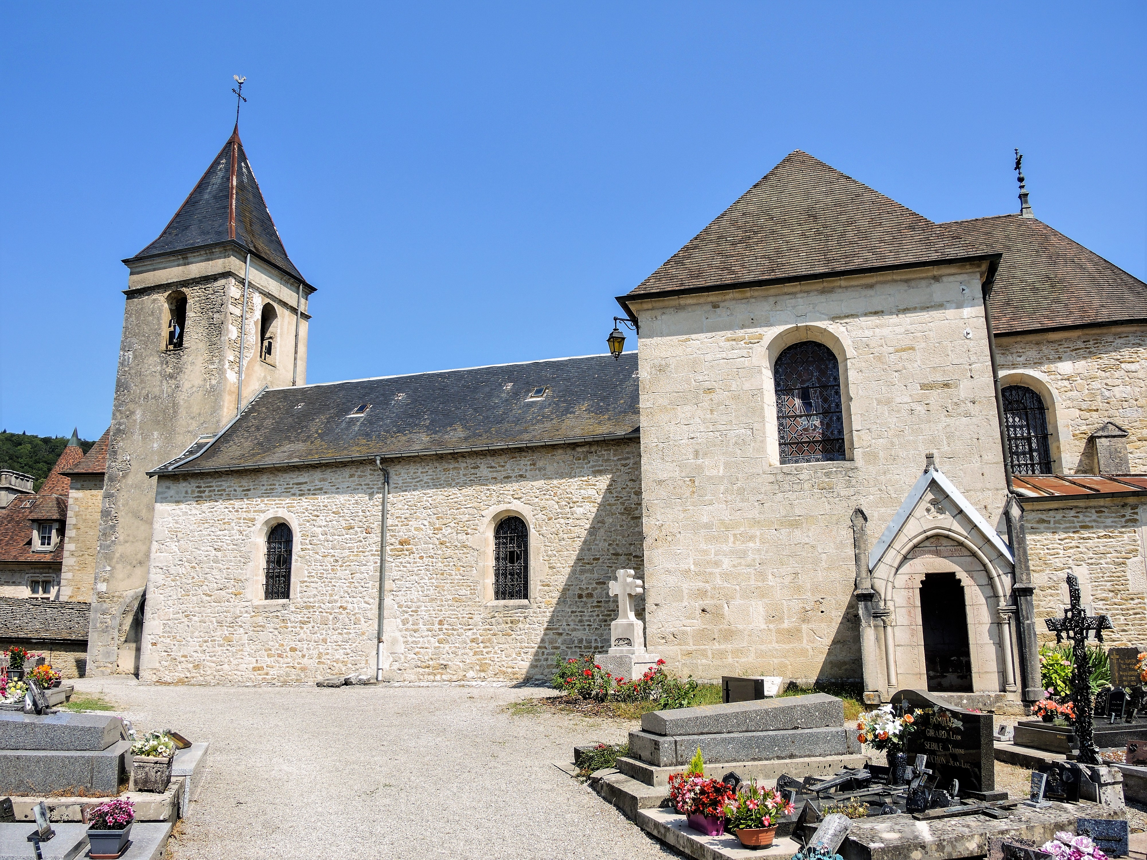 Eglise de l'Invention-des-Reliques-de-Saint-Etienne. Epeugney. Doubs